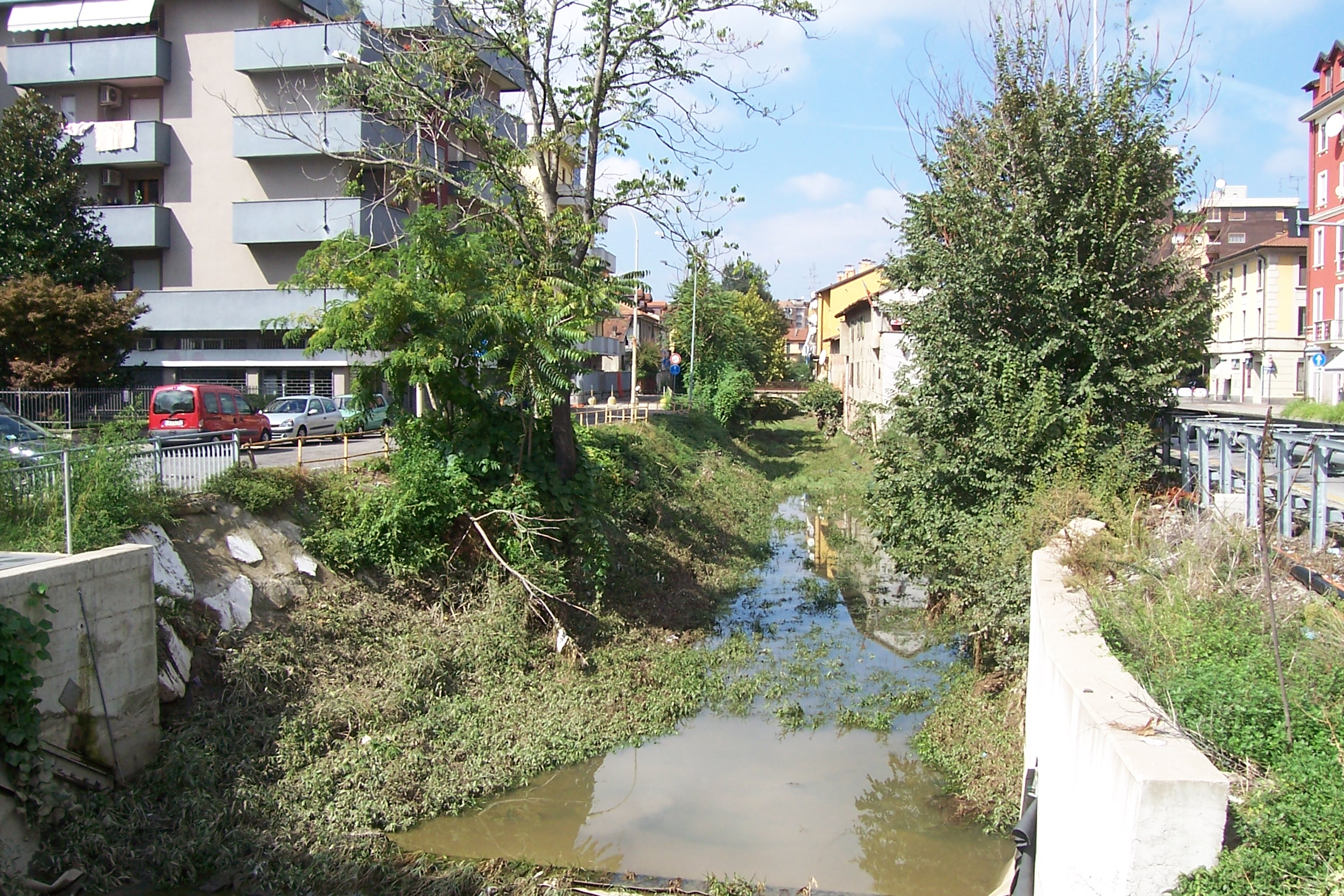 Il letto asciutto del Redefossi a San Giuliano Milanese